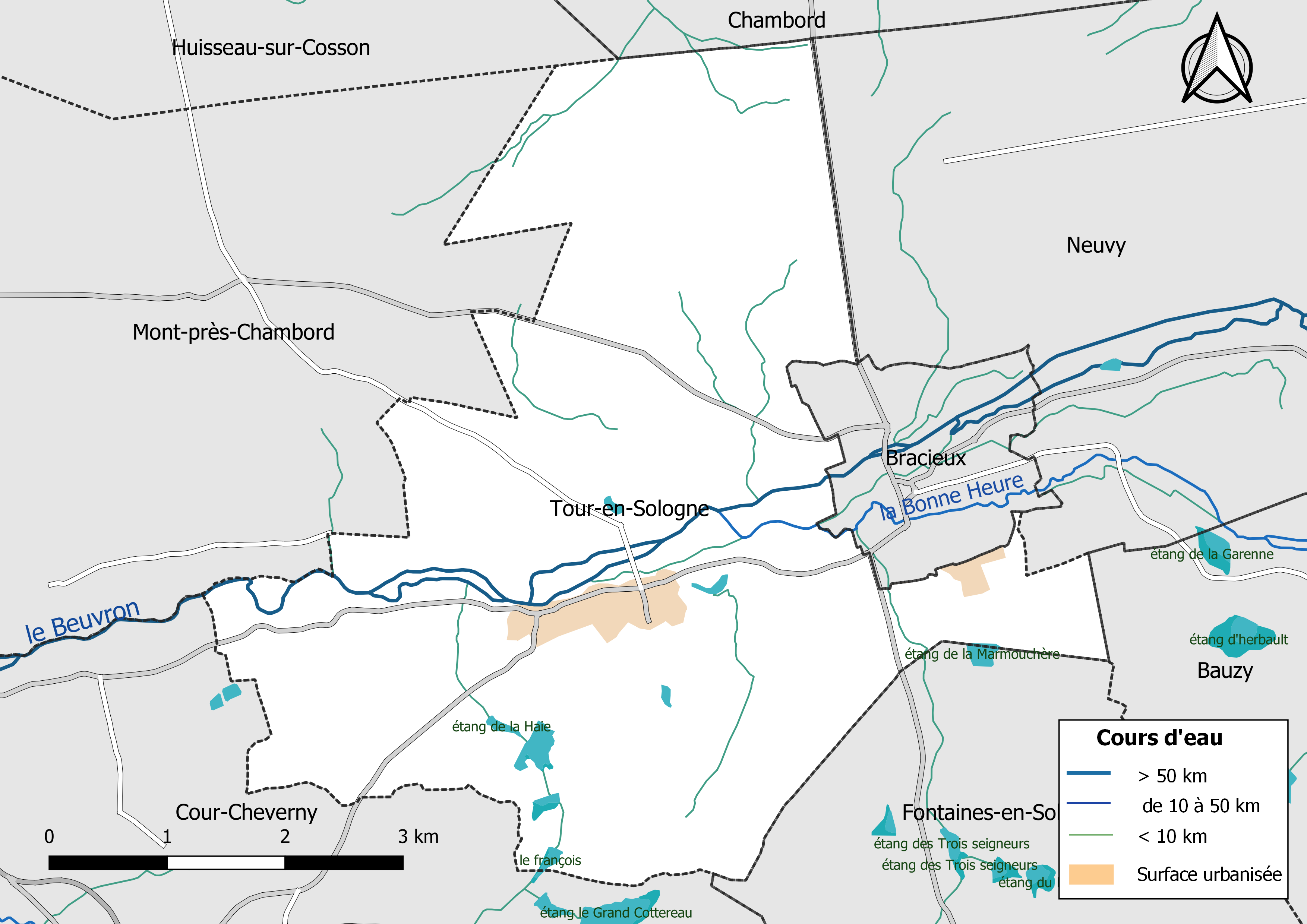 Carte du réseau hydrographique de la commune de Tour-en-Sologne (Loir-et-Cher, France).